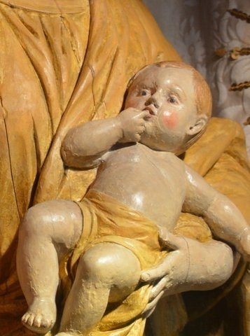 Bois polychrome du XIVéme siècle -restauré en 1998